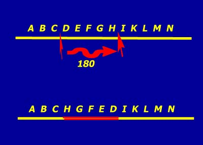 аутор: Снежана Трифуновић